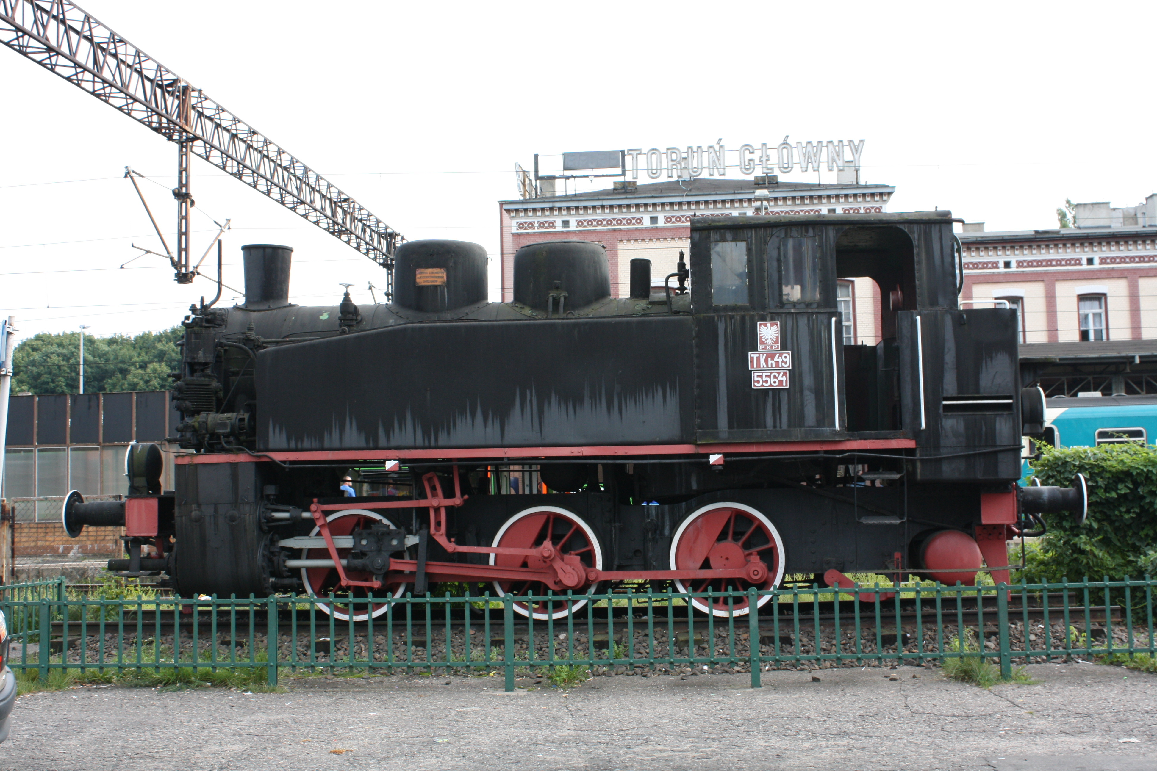 Parowóz TKh 5564 w Toruniu